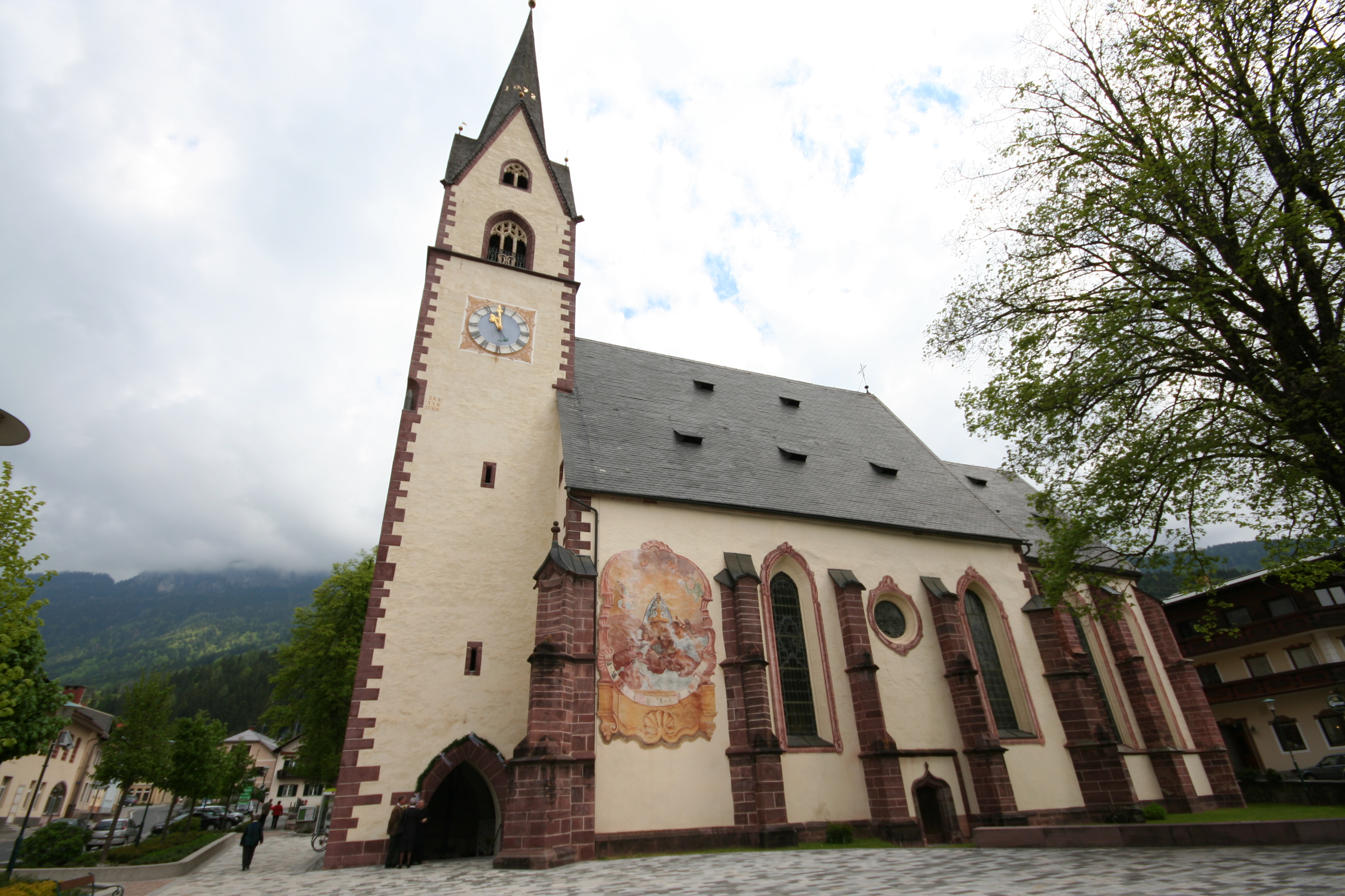 Pfarrkirche Kötschach (Gailtaler Dom)